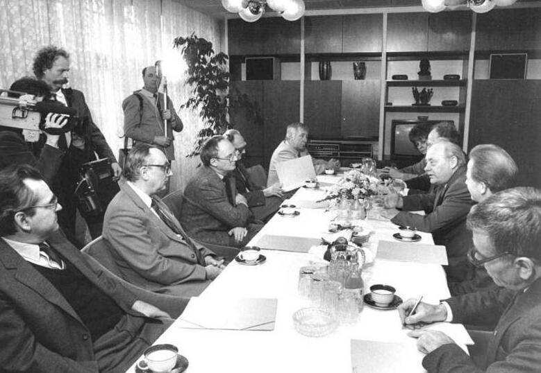 ADN-ZB Koard 11.2.87 Berlin: Meinungsaustausch. Der Vorsitzende des Bundesvorstandes des FDGB, Harry Tisch, Mitglied des Politbüros des ZK der SED (3.v.r.), und der Präsident des Schriftstellerverbandes der DDR, Hermann Kant (3.v.l.), trafen sich zu einem Meinungsaustausch über Erfahrungen und weitere Aufgaben der gemeinsamen Arbeit zusammen. An dem Gedankenaustausch nahmen die Vizepräsidenten des Schriftstellerverbandes Joachim Nowotny (l.), Juri Brezan (4.v.l.), Gerhard Holtz-Baumert (5.v.l.) und der 1. Sekretär des Verbandes, Gerhard Henniger (2.v.l.), teil.